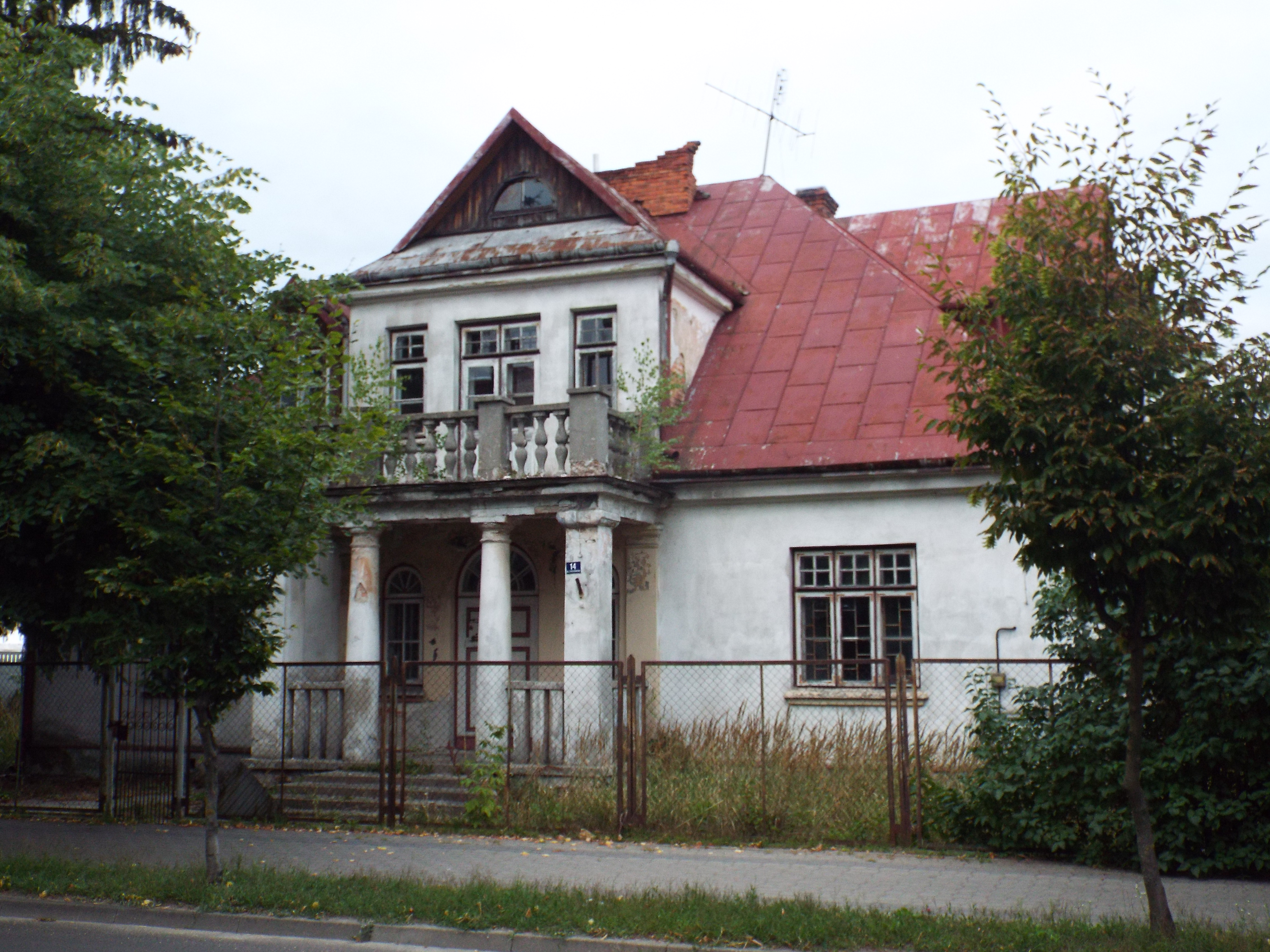 Włodawa, ul. Piłsudskiego 14 (dawna komendantura powiatowa MO)